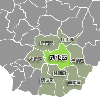 新化區相對位置